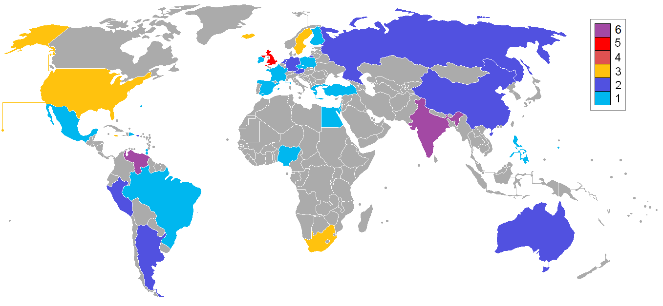 Carte montrant les lauréates par pays